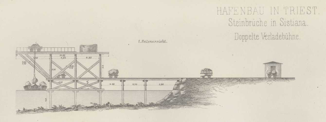 historischer Druck, Hafenbau Triest (aus: Allgemeine Bauzeitung, Jg. 1874)